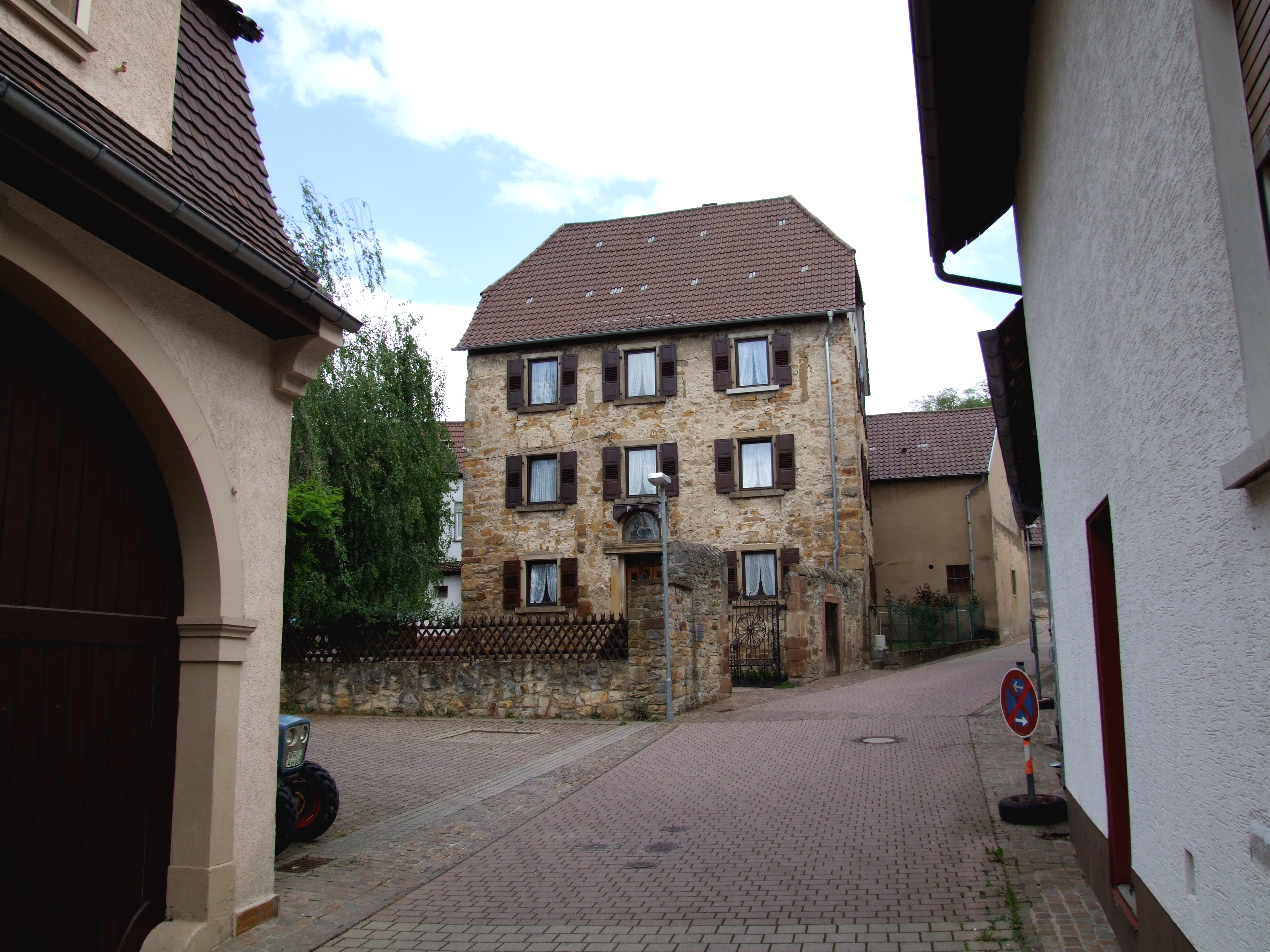 Haus in Rauenberg-Rotenberg